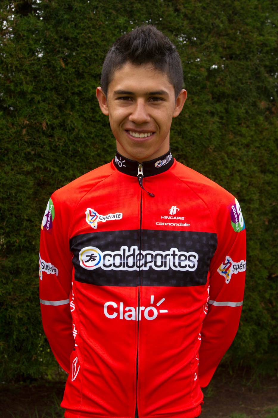 Javier Gómez con el maillot del Colombia Coldeportes en 2013